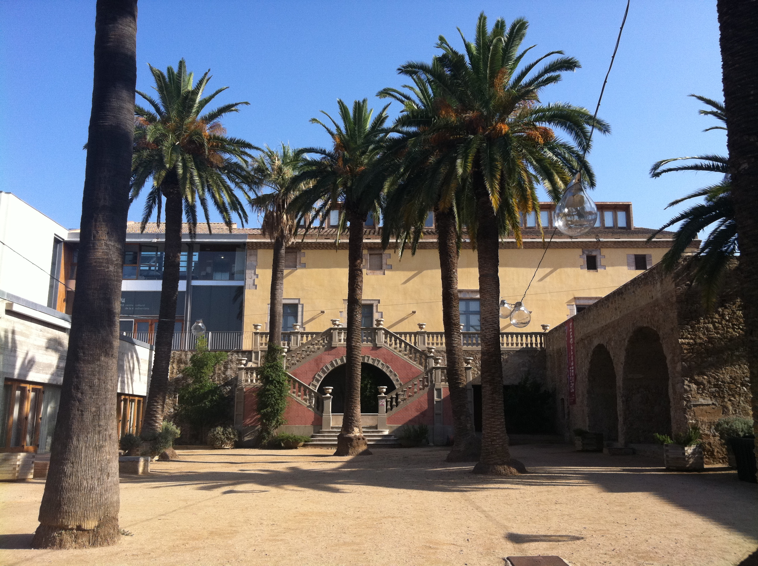 Museu de la Mediterrània- Can Quintana